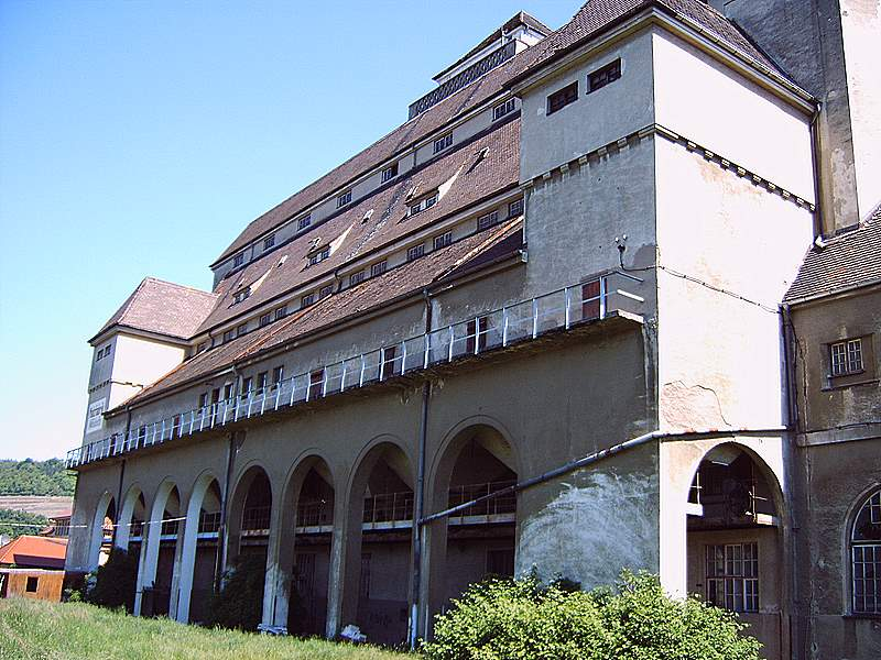 Rückseite des Silos des ehemaligen Reichsswefelwerkes in Haßmersheim